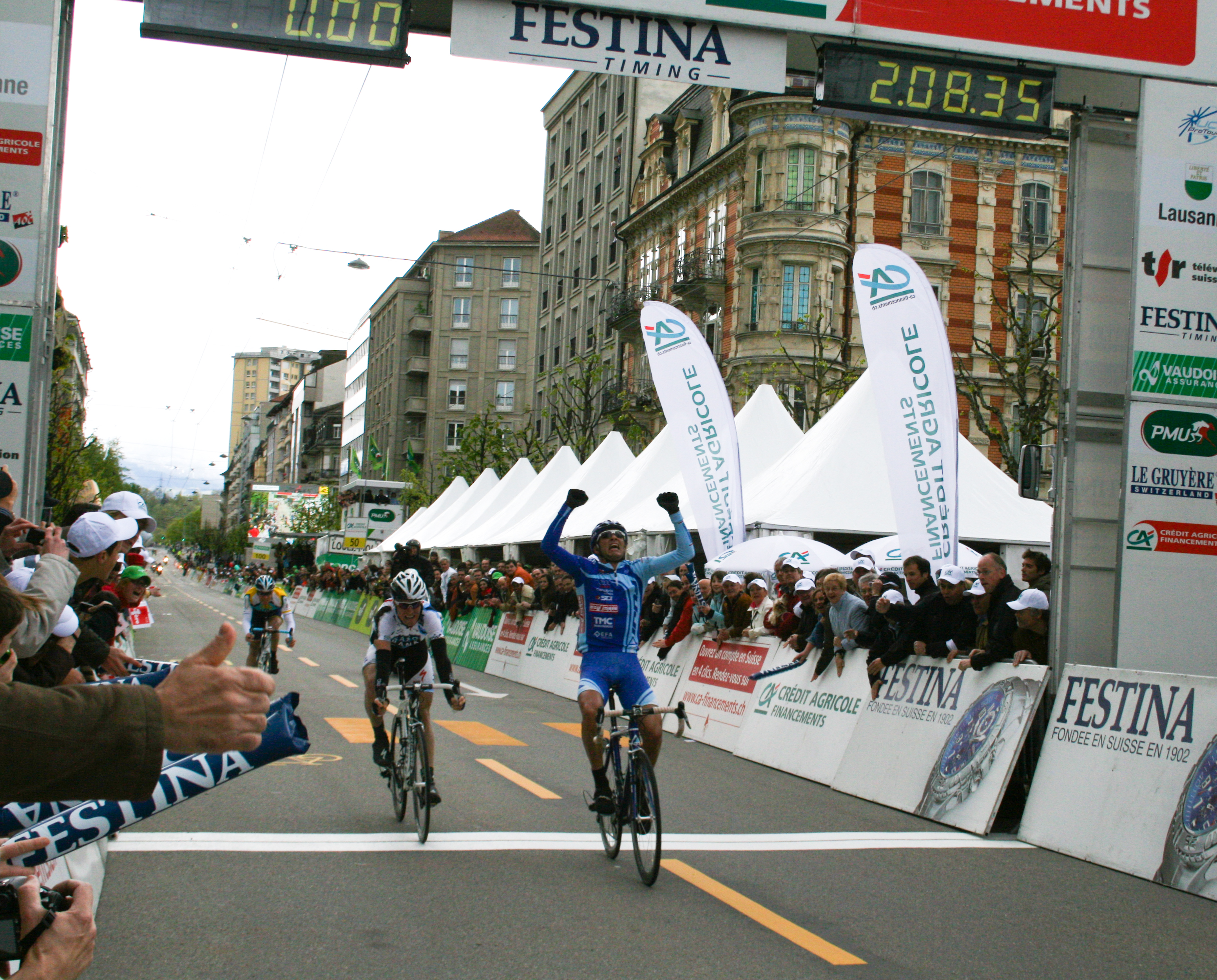 Arrivée de la première étape du Tour de Romandie 2009.